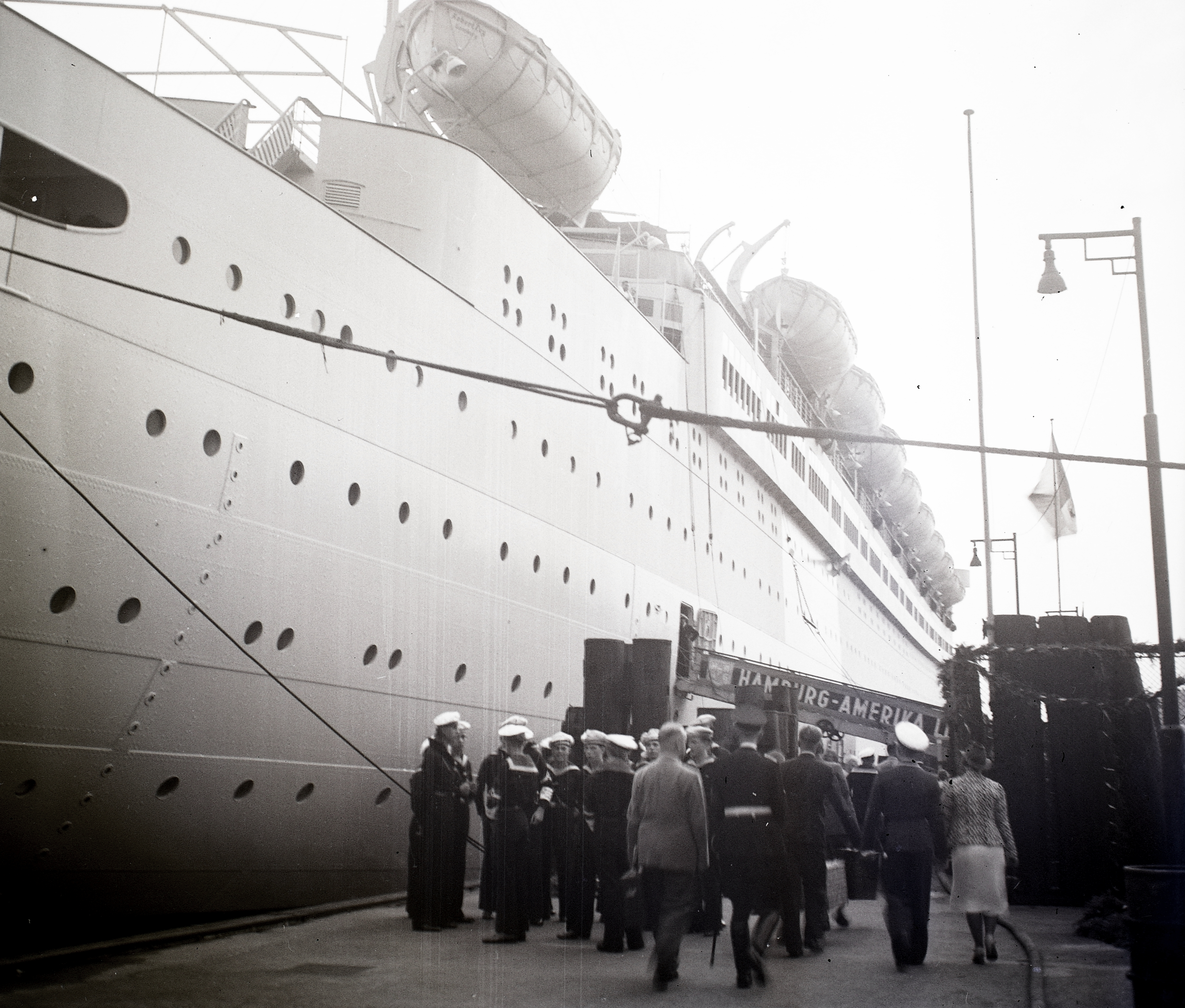 a Robert Ley német óceánjáró hajó. Location: Germany, Hamburg Tags: ship, cruise ship, lifeboat, sailor Title: a Robert Ley német óceánjáró hajó.